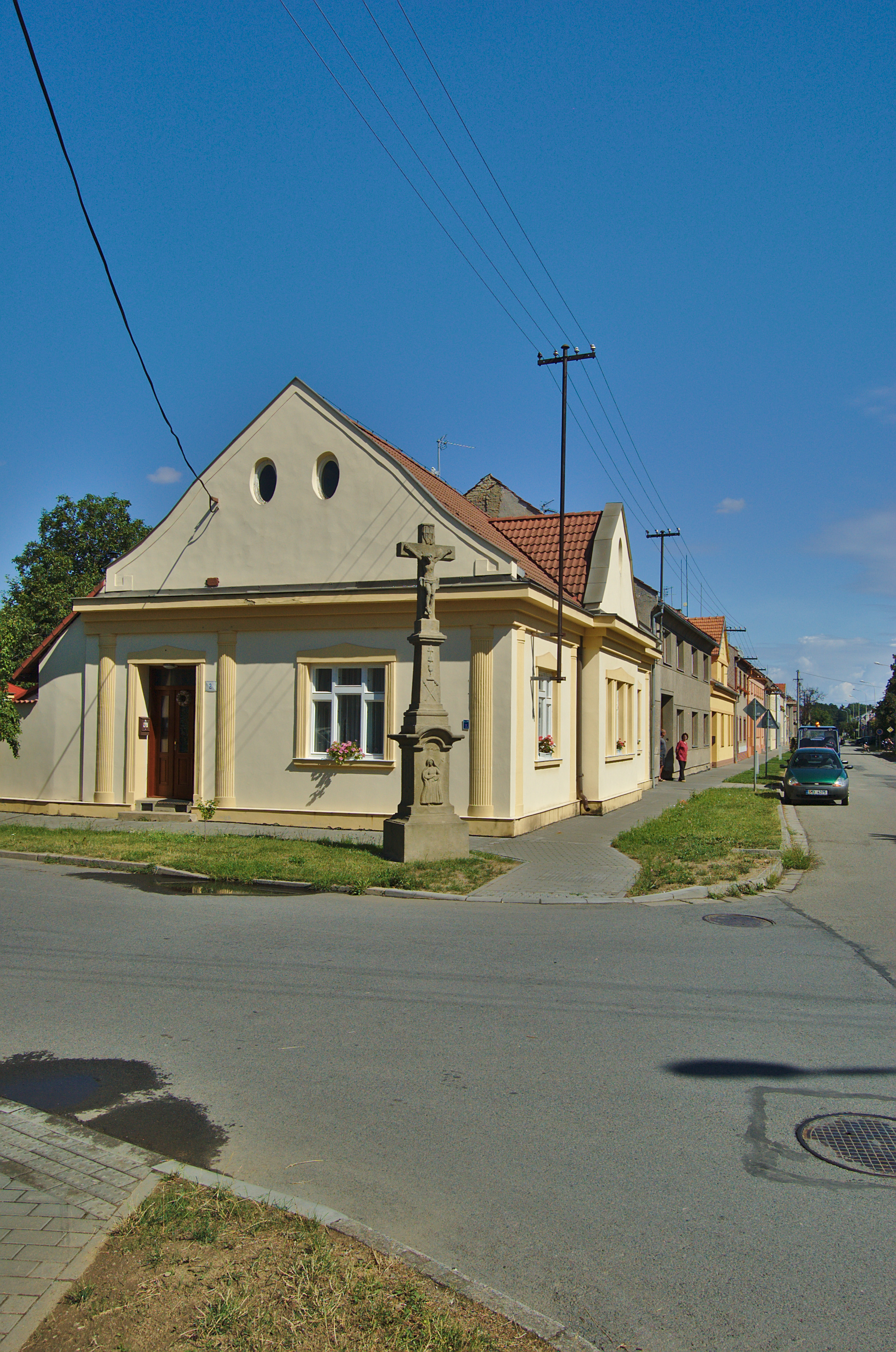 Kříž na rohu ulic 5. května a Čechovická, u domu čp. 188, Čechovice, Prostějov